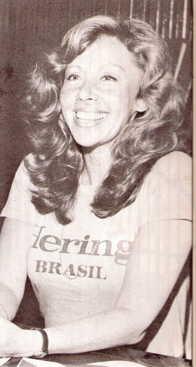 locutora nora perlé